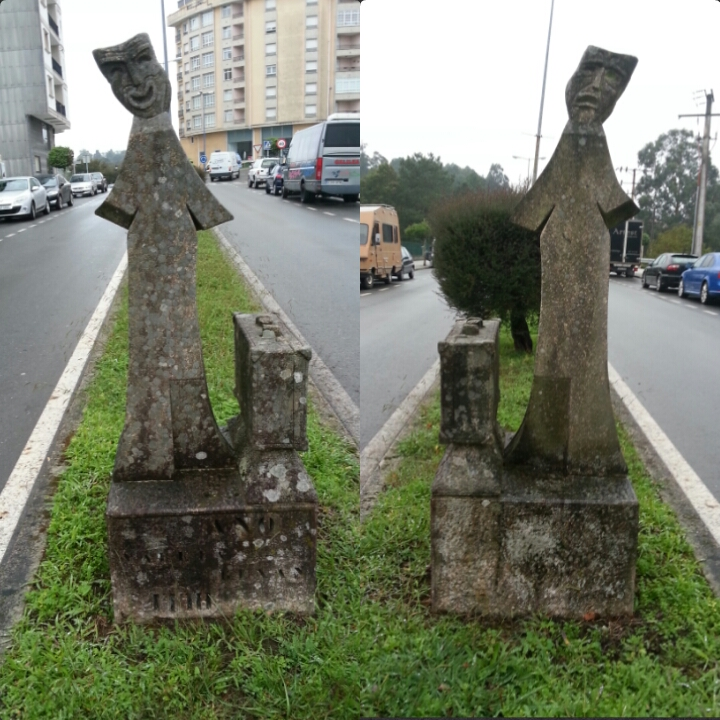 Este monumento conmemorativo de Varela Buxán atópase na Rúa da cultura da Estrada, Pontevedra